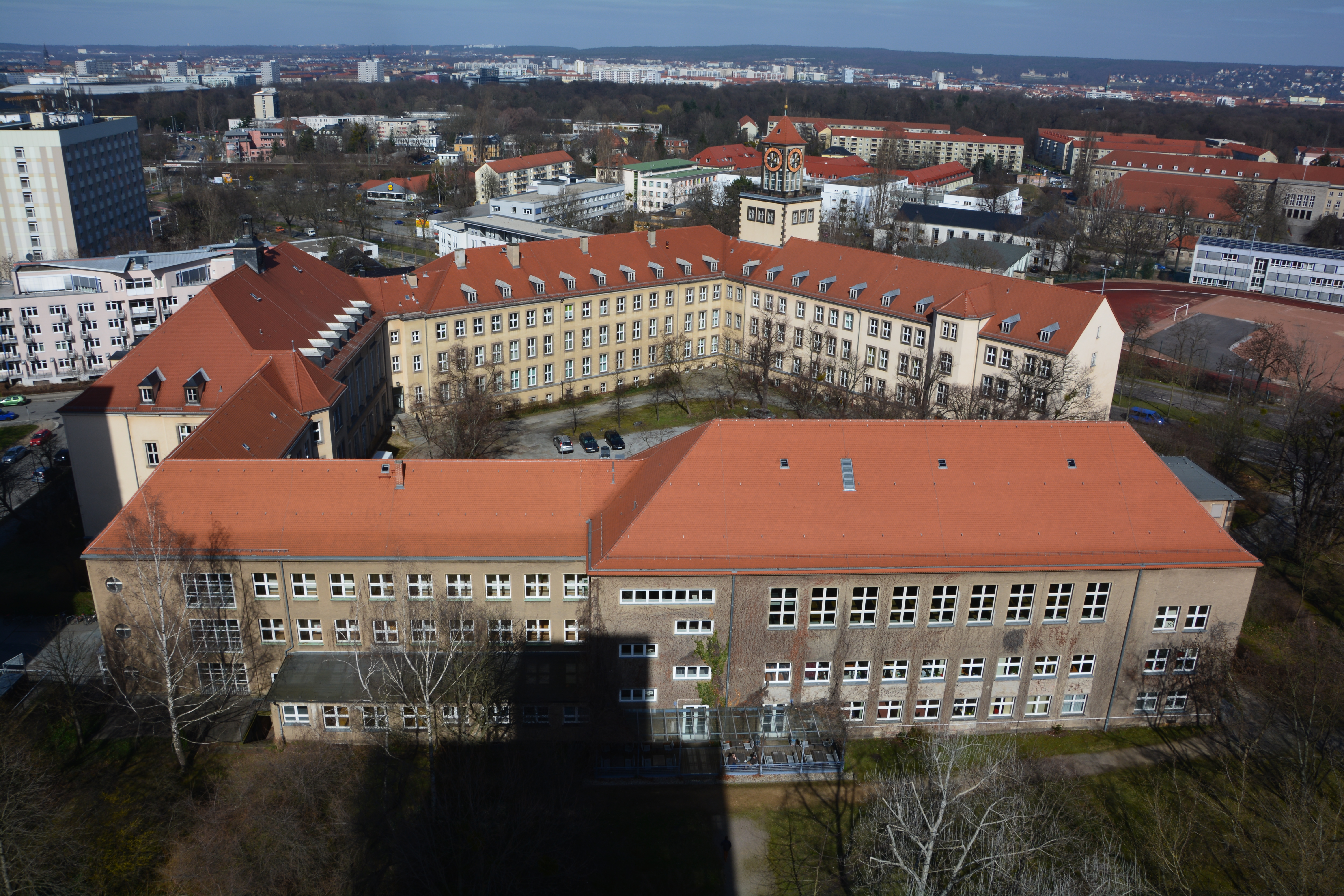 Dresden, TU-Gebäude am Weberplatz (ehem. Königliches Lehrerseminar; Arbeiter -und Bauernfakultät) heute Erziehungswissenschaftliche Fakultät am Weberplatz. Südflügel